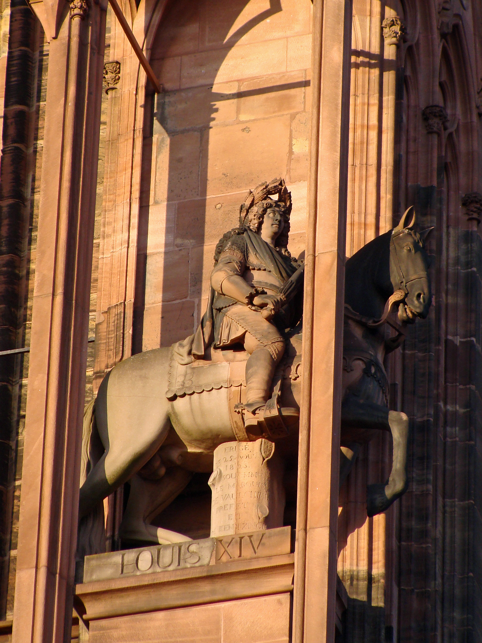 Strasbourg, cathédrale Notre-Dame, statue de Louis XIV sculptée par Jean-Baptiste Vallastre sur la façade principale.